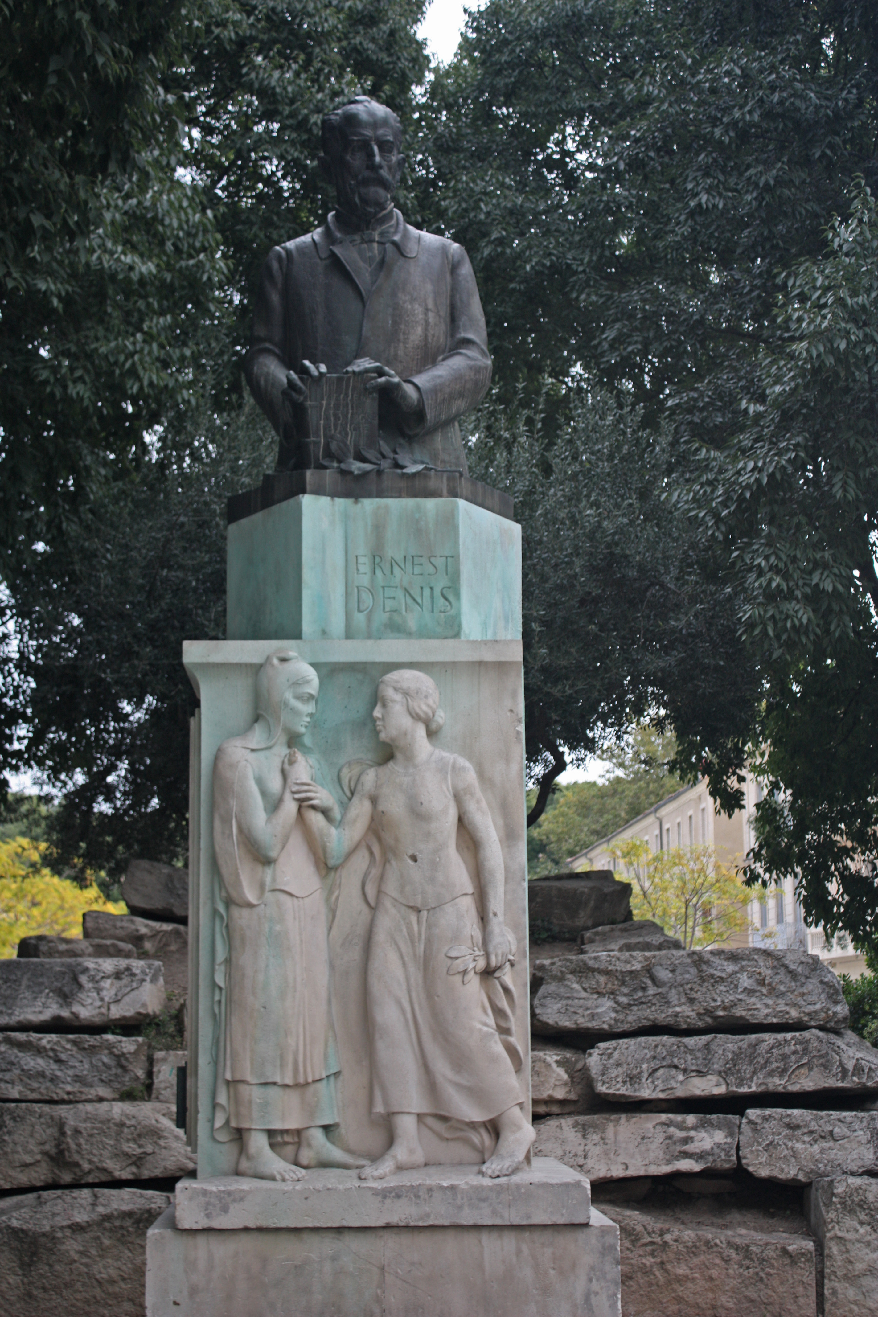 Monument à la gloire d'Ernest Denis, rue Gaston Boissier, séparé des aménagements contemporains de la place d'Assas par un écran de verdure. Professeur d'histoire et républicain affirmé, E. Denis fut, comme l'indique le bas-relief, farouche partisan du rapprochement de la France et des peuples Slaves